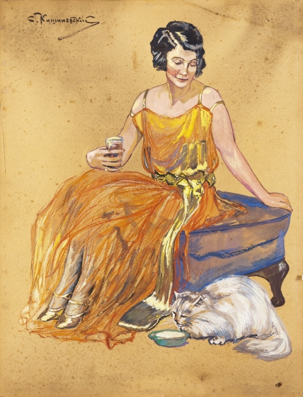 "Дама с котом". Картон, пастель, гуашь. 37,2 x 28,5 см.